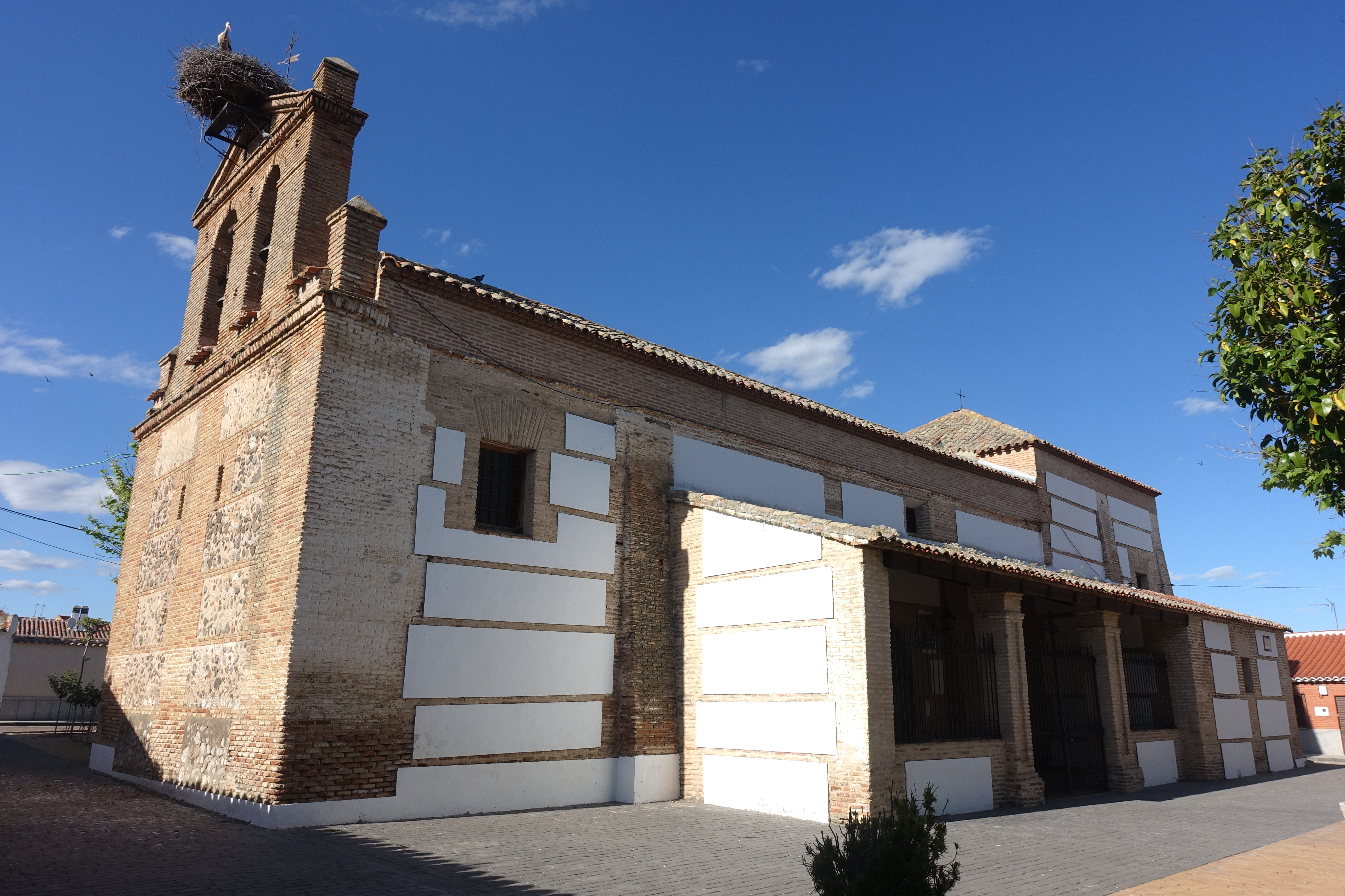 Iglesia de Nuestra Señora de la Asunción, Albarreal de Tajo (Toledo, España).